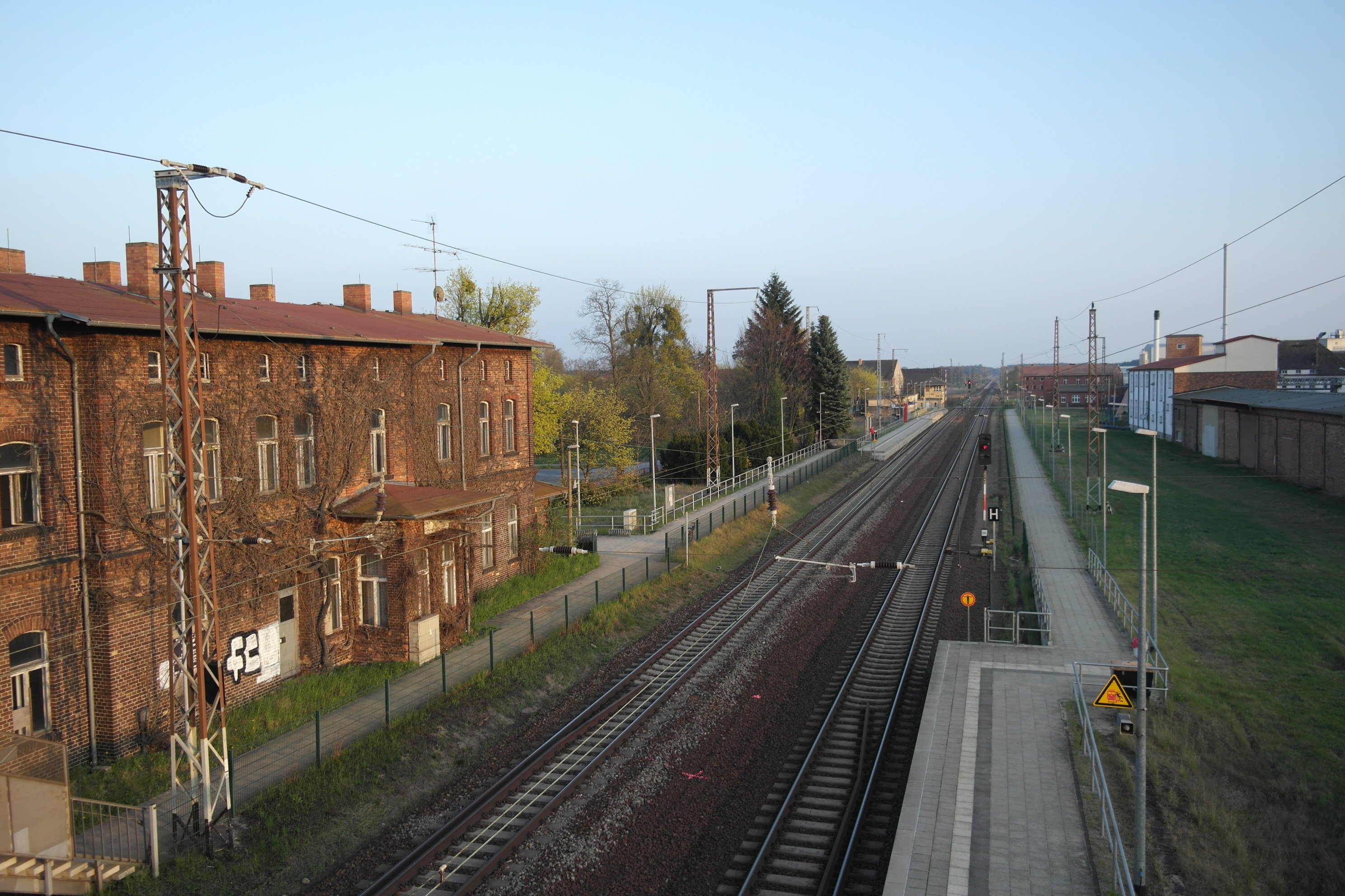 Bahnhof Golßen, Blick von der Fußgängerbrücke